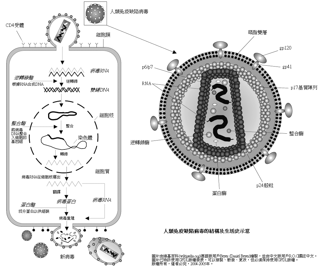 原圖由德語版用戶Beyer繪製，本人加註中文。